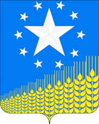 Герб хутора Средние Чубурки Кущевского района Краснодарского края